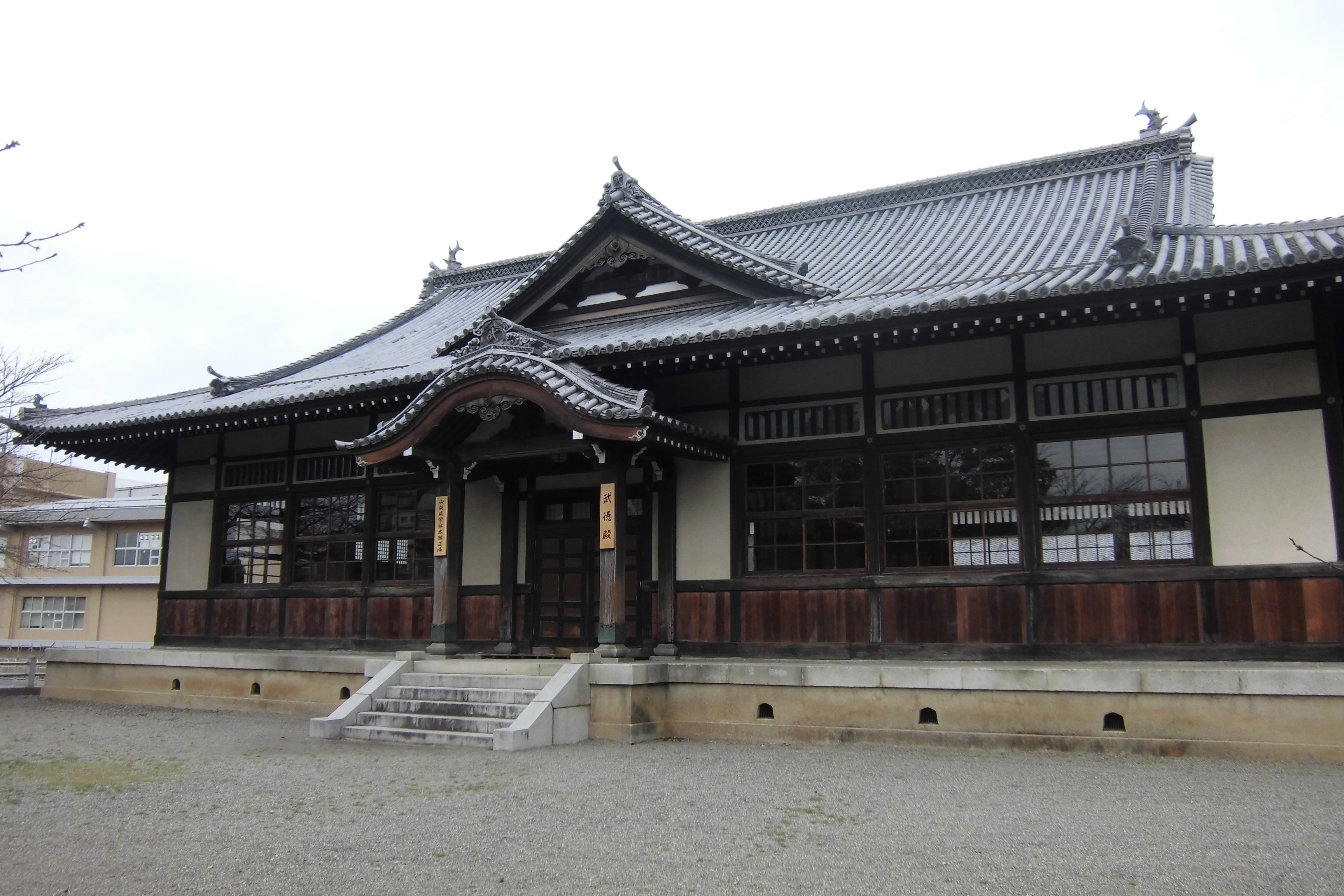 山梨県甲府市・甲府城跡の武徳殿